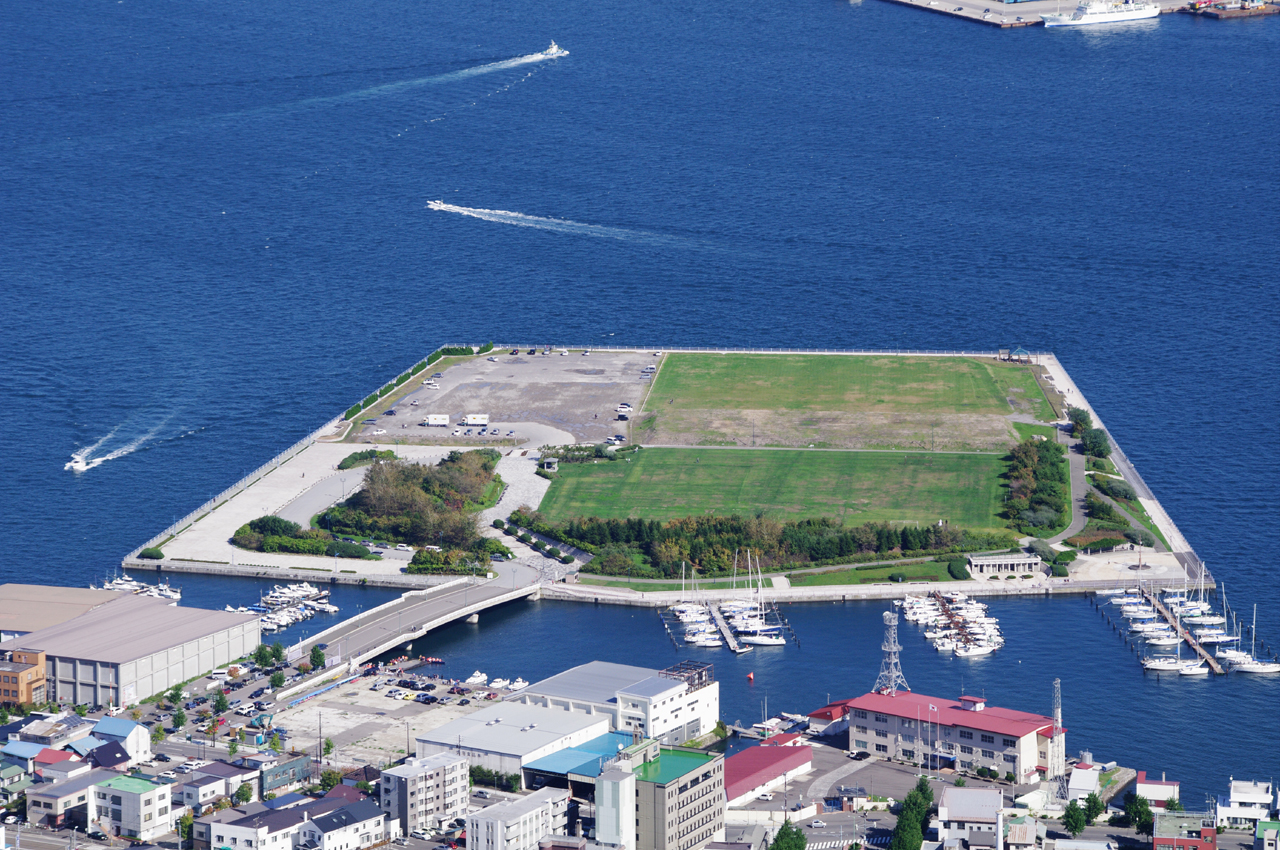 緑の島（函館山から）